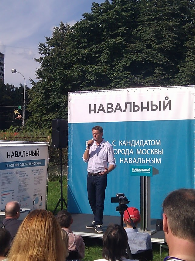 Встреча А.Навального, кандидата в меры Москвы, с избирателями в р-не Выхино 18.08.2013